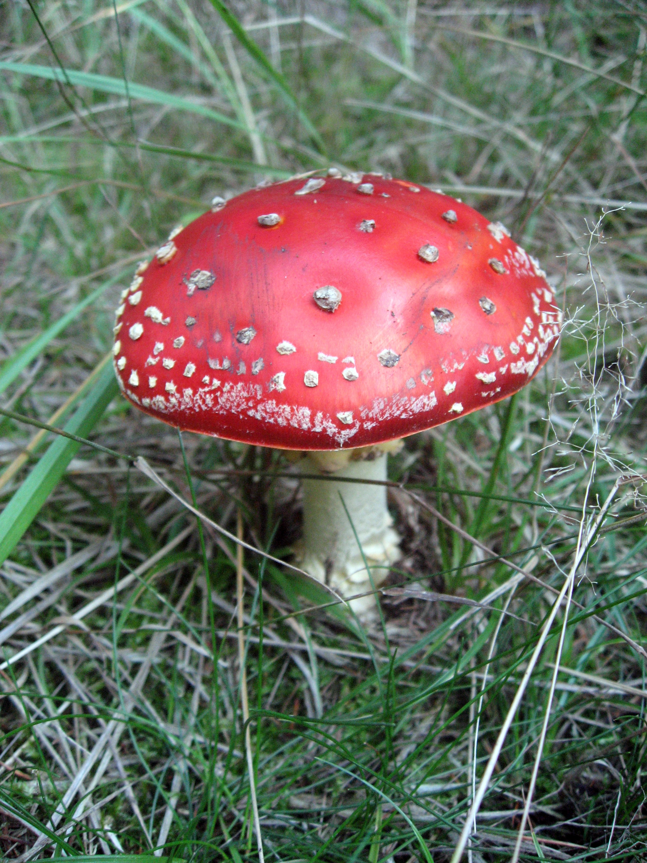 Muchomůrka červenáLatina: Amanita muscaria